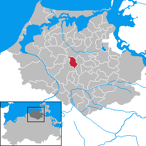 Weitenhagen in Mecklenburg-Vorpommern - District Nordvorpommern